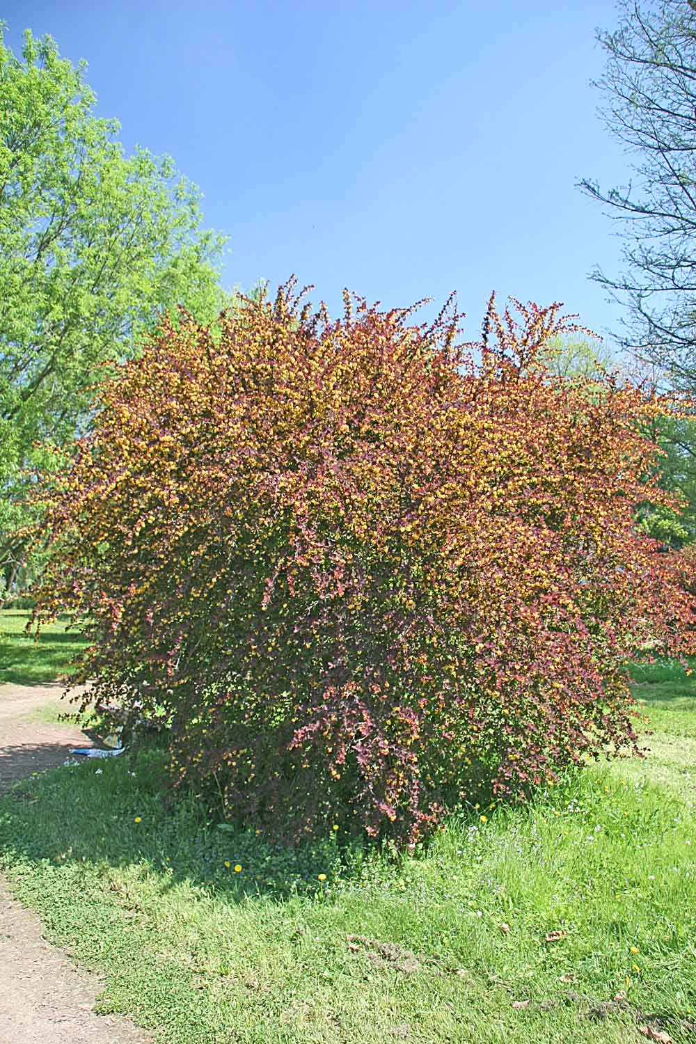 Berberis thunbergii var. Atropurpurea autor:Prazak